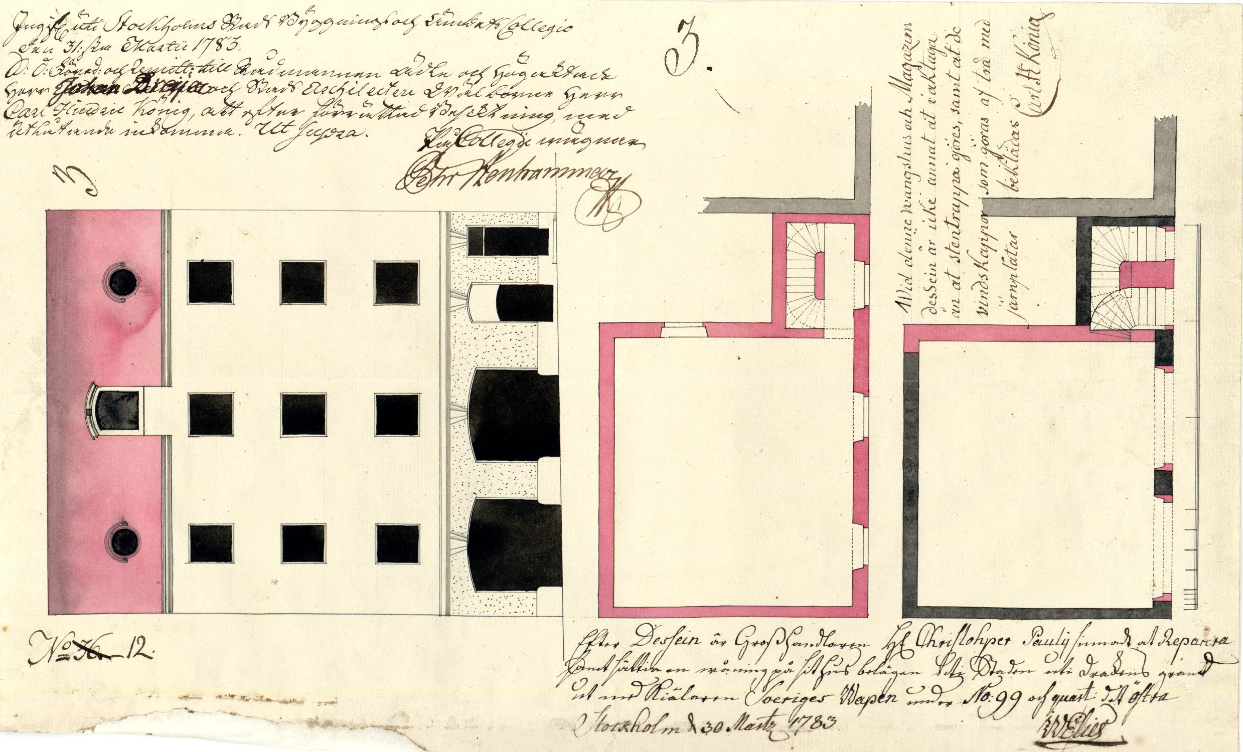 Ritning av J.W Elies, kv. Apollo, Drakens gränd, beställare Grosshandlaren Hr Christopher Pauli